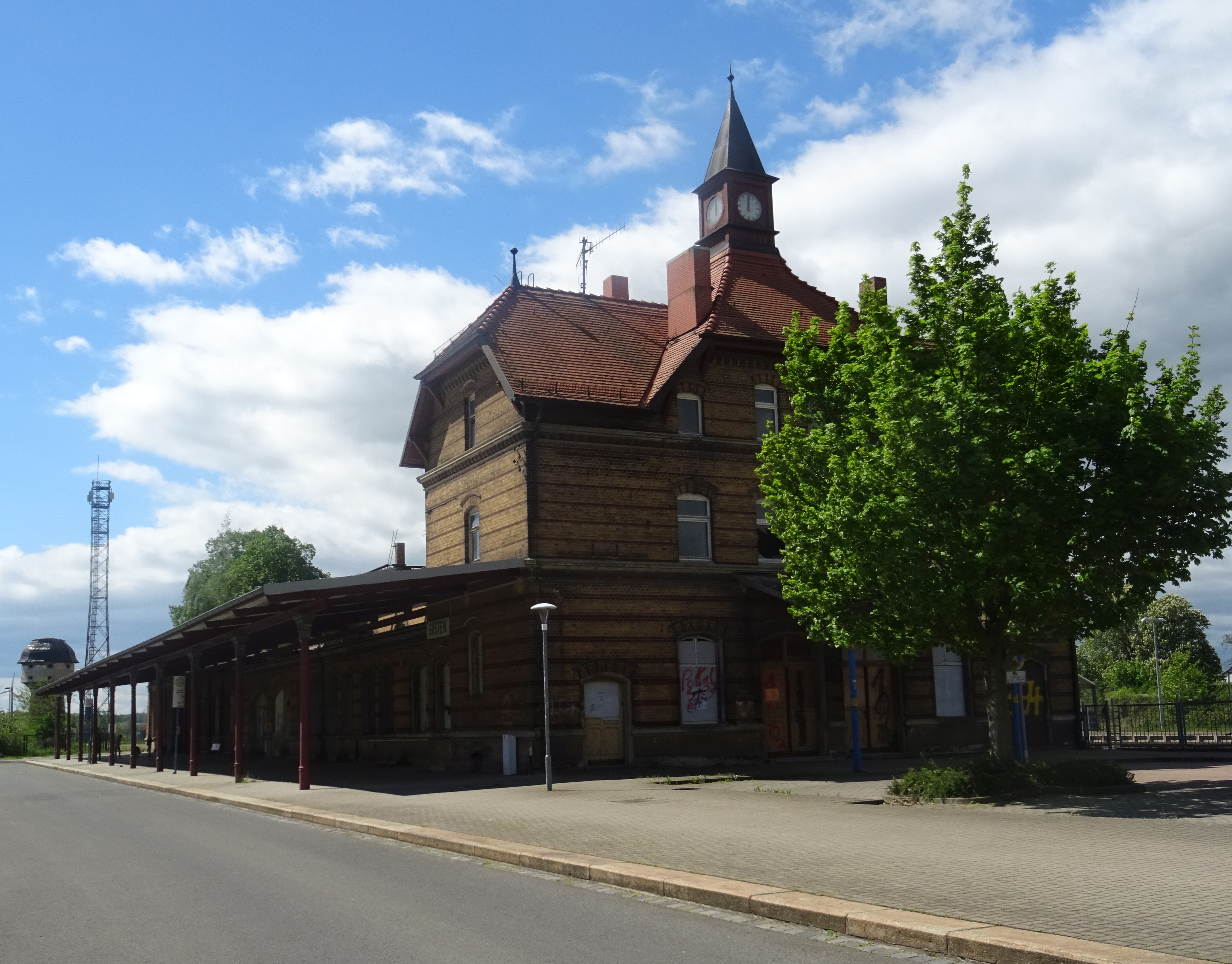 Bahnhof Güsten, Kulturdenkmal, frühere Kanonenbahnseite